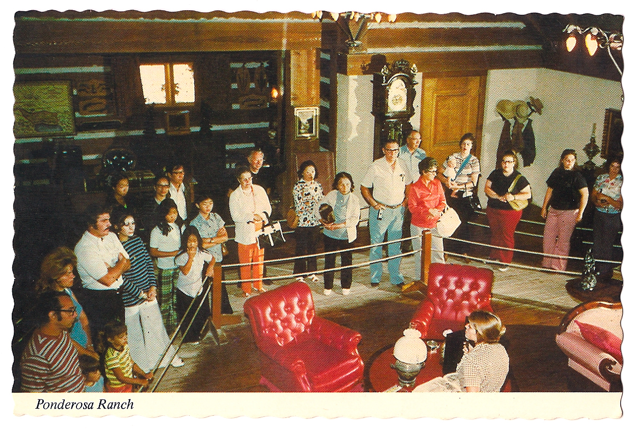 Bonanza-Ponderosa Ranch-postcard-03